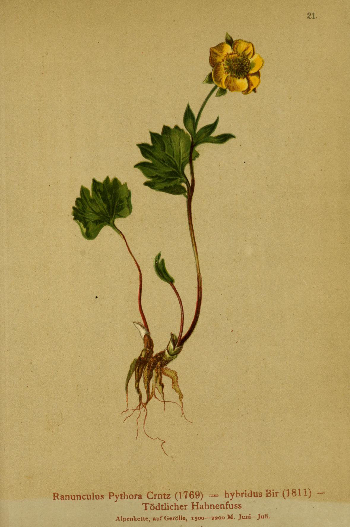 ZI. Ranunculus Pythora Crntz (1769) ==" hybridus Bir (1811) Tödtlicher Hahnenfuss Alpenkette, auf GeröUe, 1500— 2200 M. Juni— JuH.